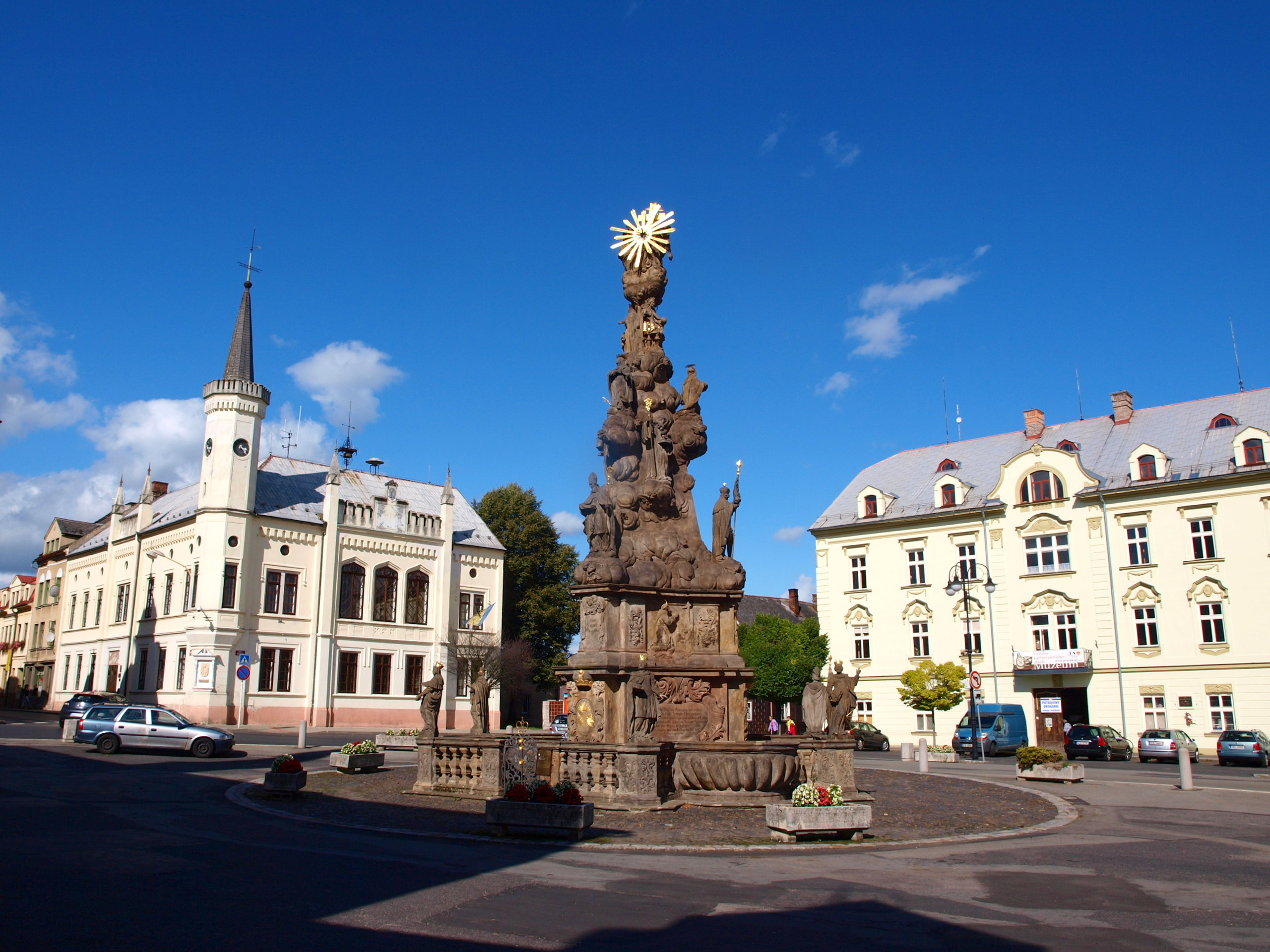 Zákupy náměstí